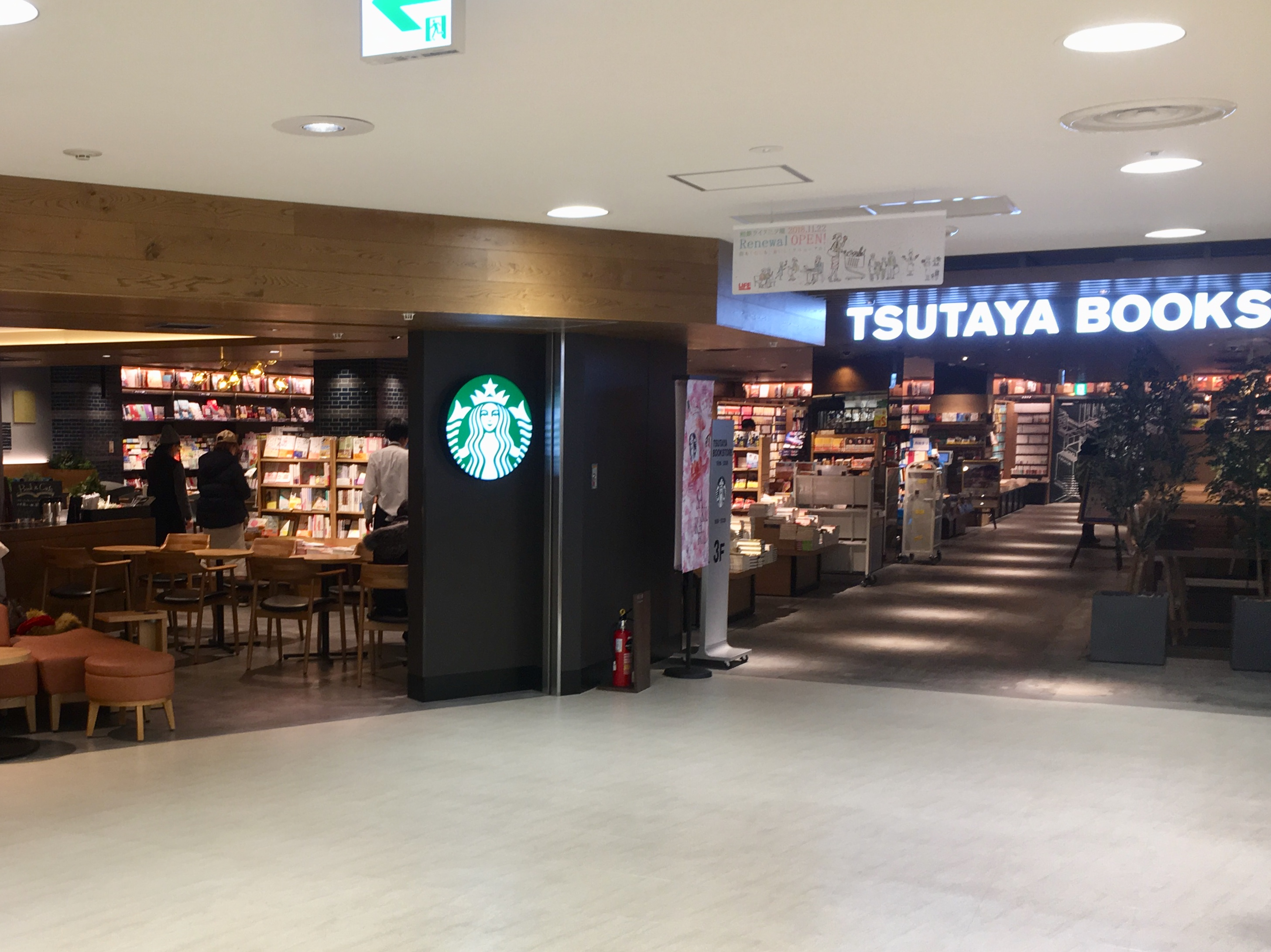 相鉄線三ツ境駅の駅ビル「相鉄ライフ 三ツ境」（三ツ境ライフ）。2018年のリニューアルにより、3階にスターバックスコーヒー併設のTSUTAYA BOOK STOREがオープン。 ※スターバックスは横浜市瀬谷区初出店